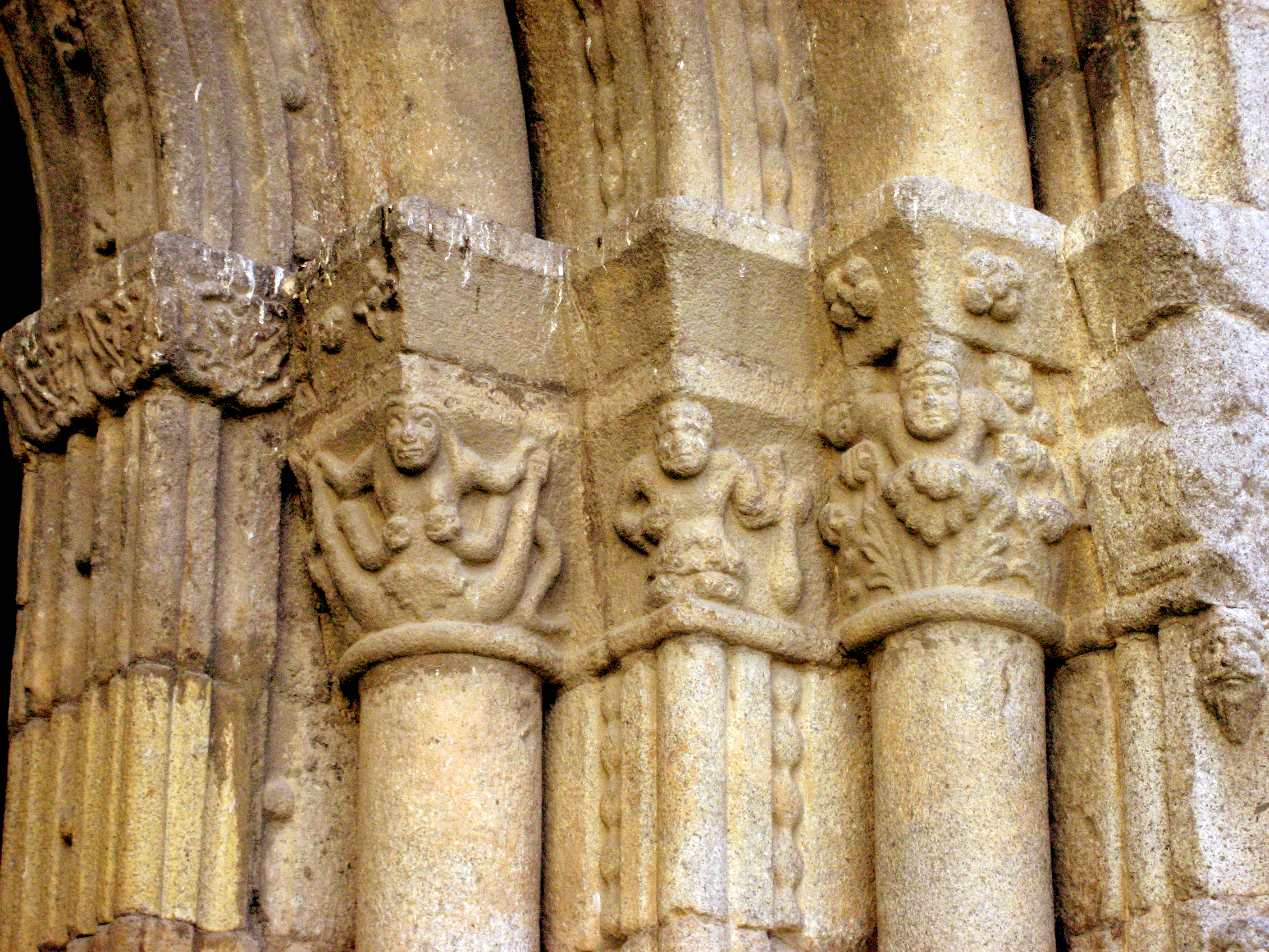 Capiteles de la portada norte de la catedral de la Seu d'Urgell en Cataluña (España)